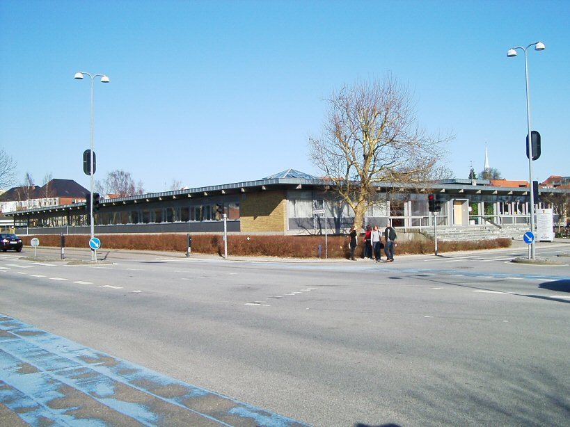 Bild der Deutschen Büchereizentrale und Zentralbücherei Apenrade